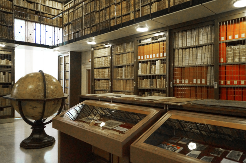 Palazzo della Signoria This is a photo of a monument which is part of cultural heritage of Italy.